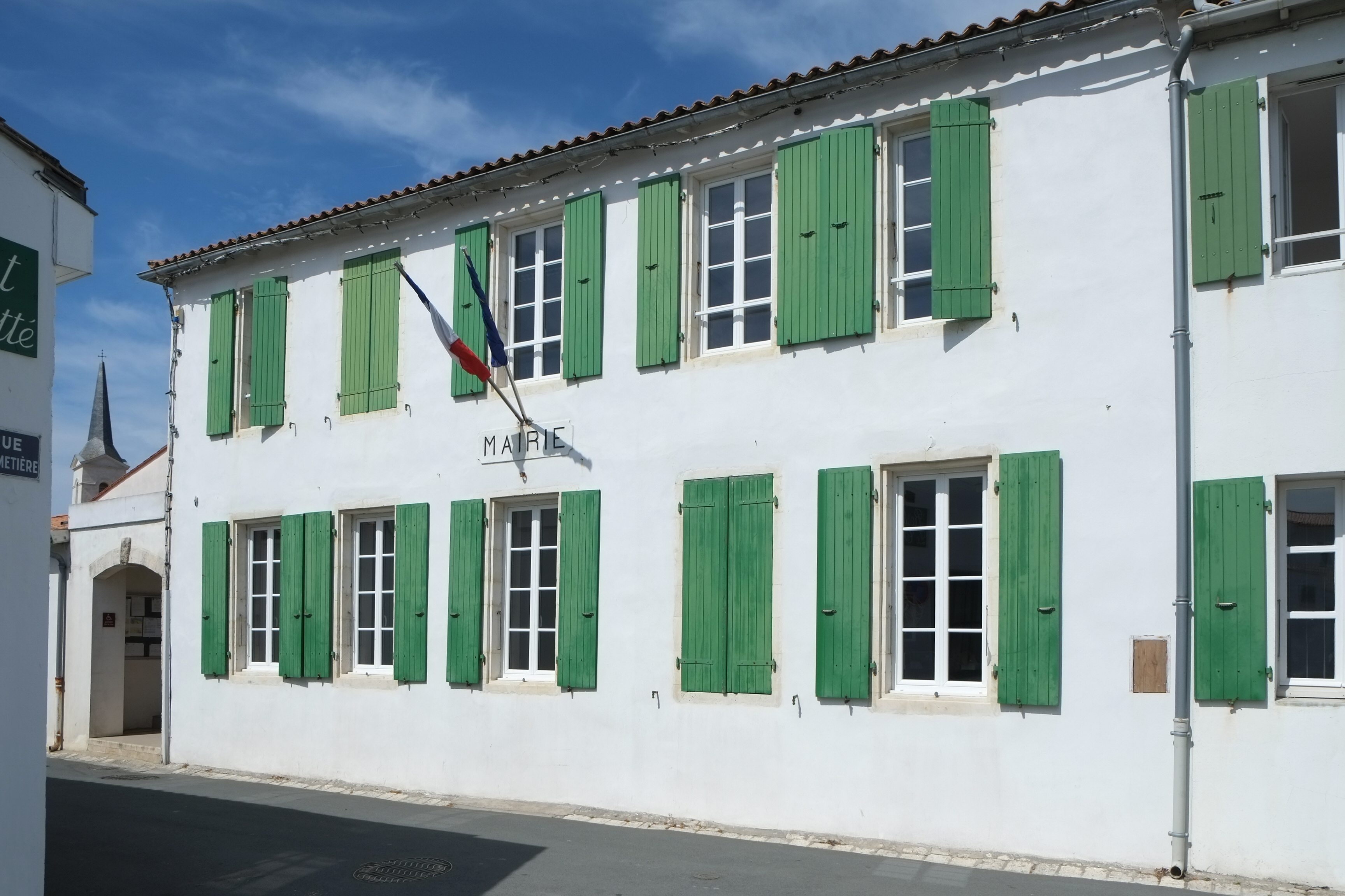 Mairie Saint-Clément-des-Baleines Charente-Maritime France